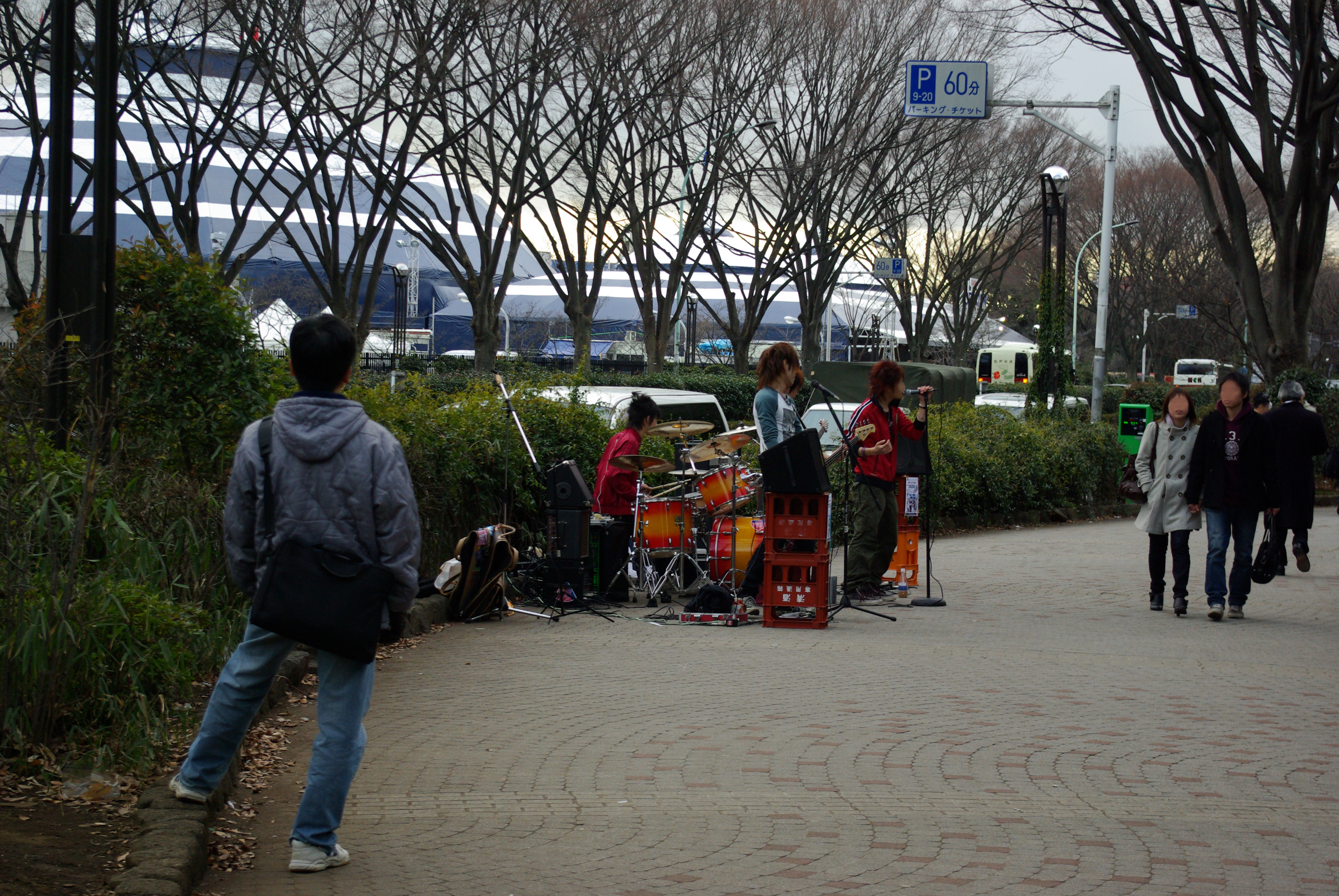 StreetLive(路上ライブ) performers and listener.